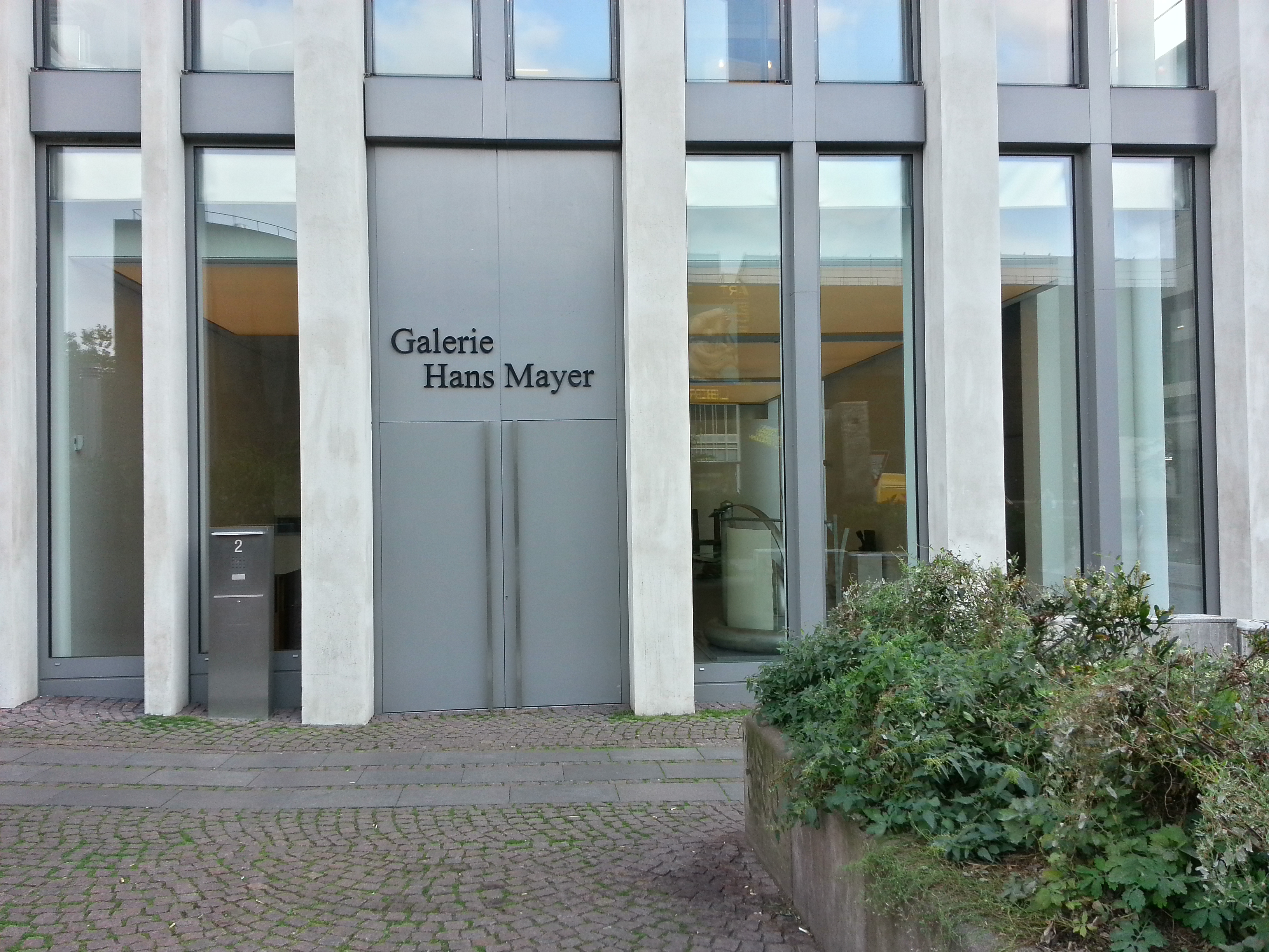 Die Galerie von Hans Mayer befindet sich in Düsseldorf am Grabbeplatz 2